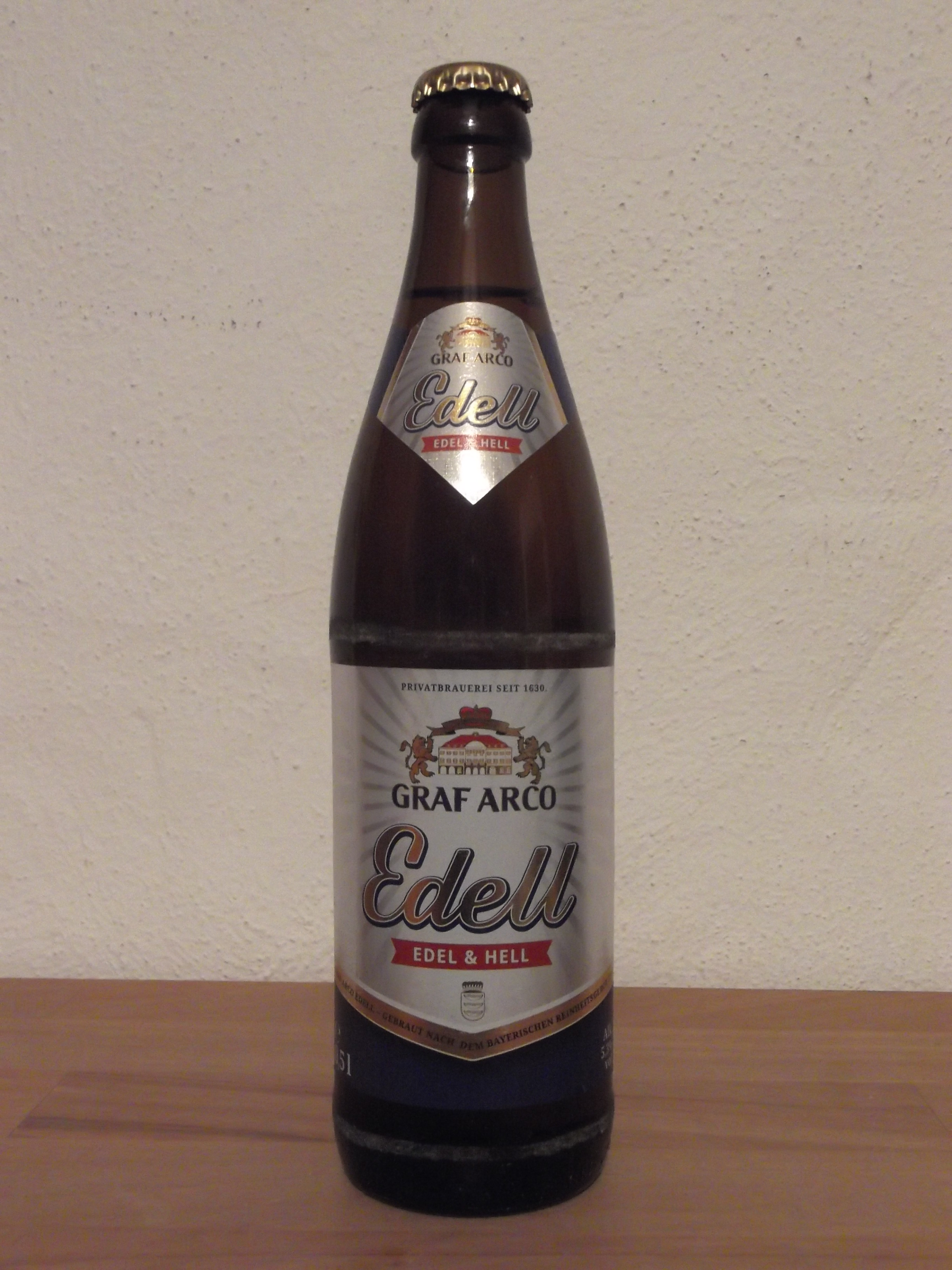 Flaschenabfüllung 0,5l